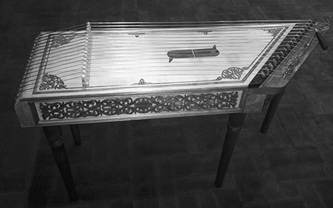 Բաս Քանոն Նվարդ